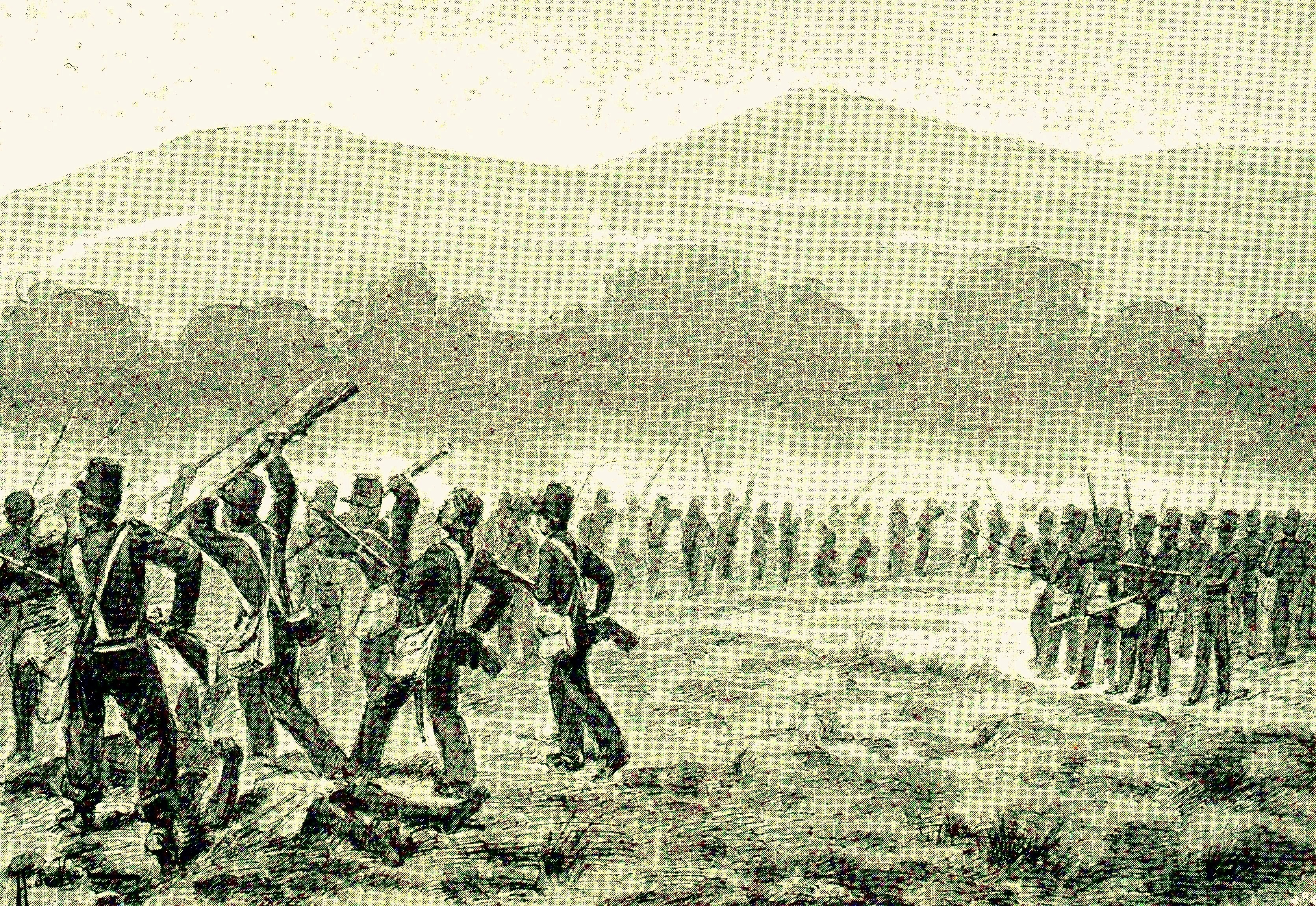 Bij Goenoeng Maraksa